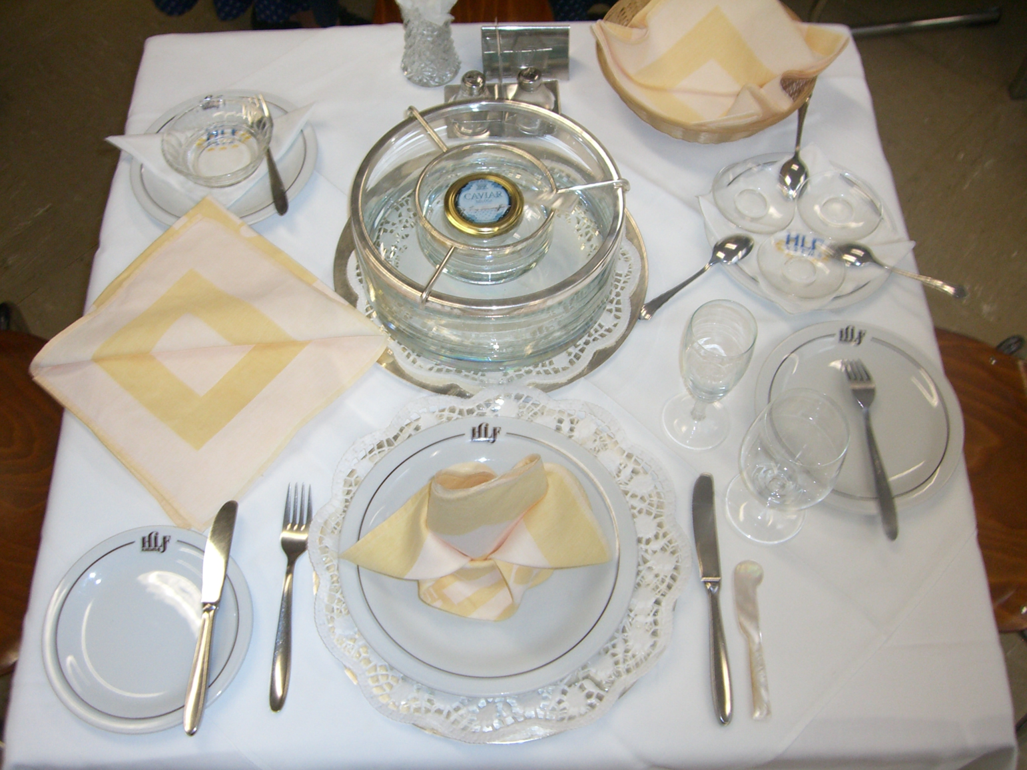 Spezialgedeck für Kaviar